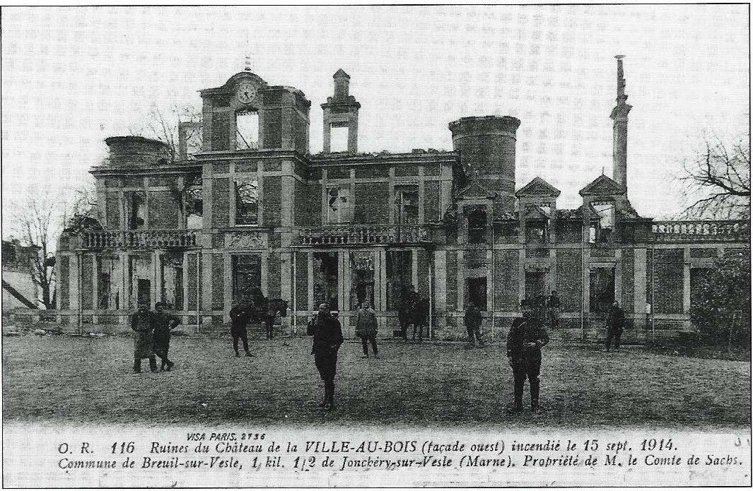 destructions de la Première Guerre mondiale .